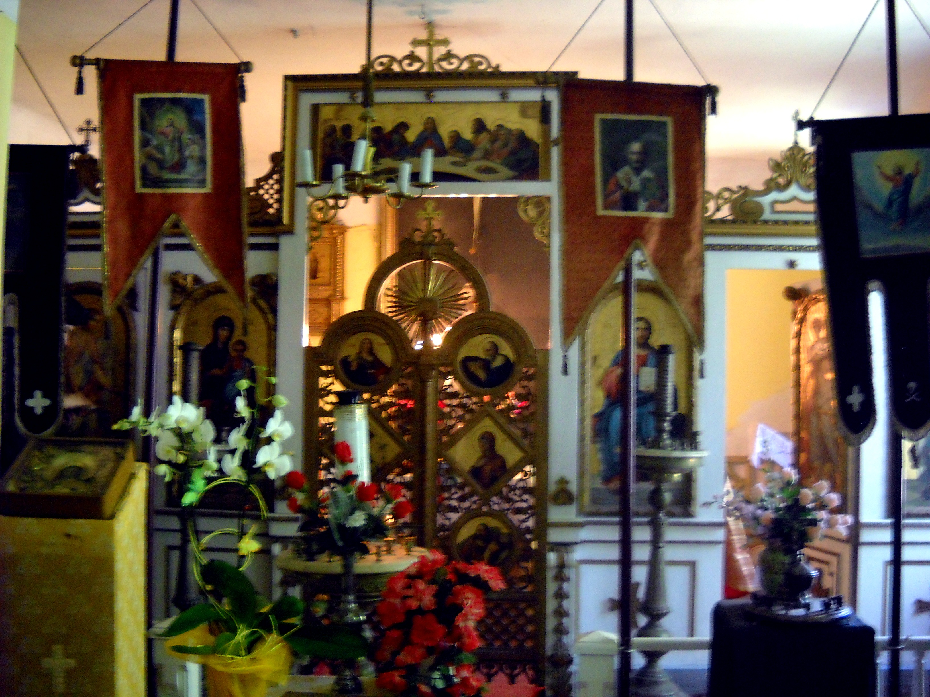 Wnętrze kaplicy prawosławnej w Aleksandrowie Kujawskim